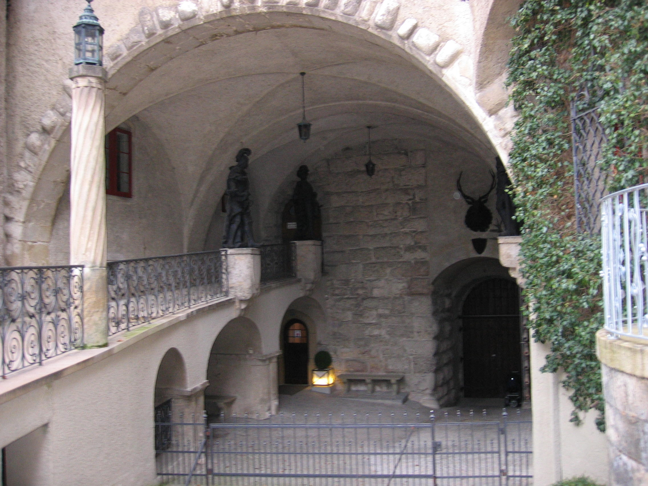 Inner courtyard of Schloss Sigmaringen in Baden-Württemberg